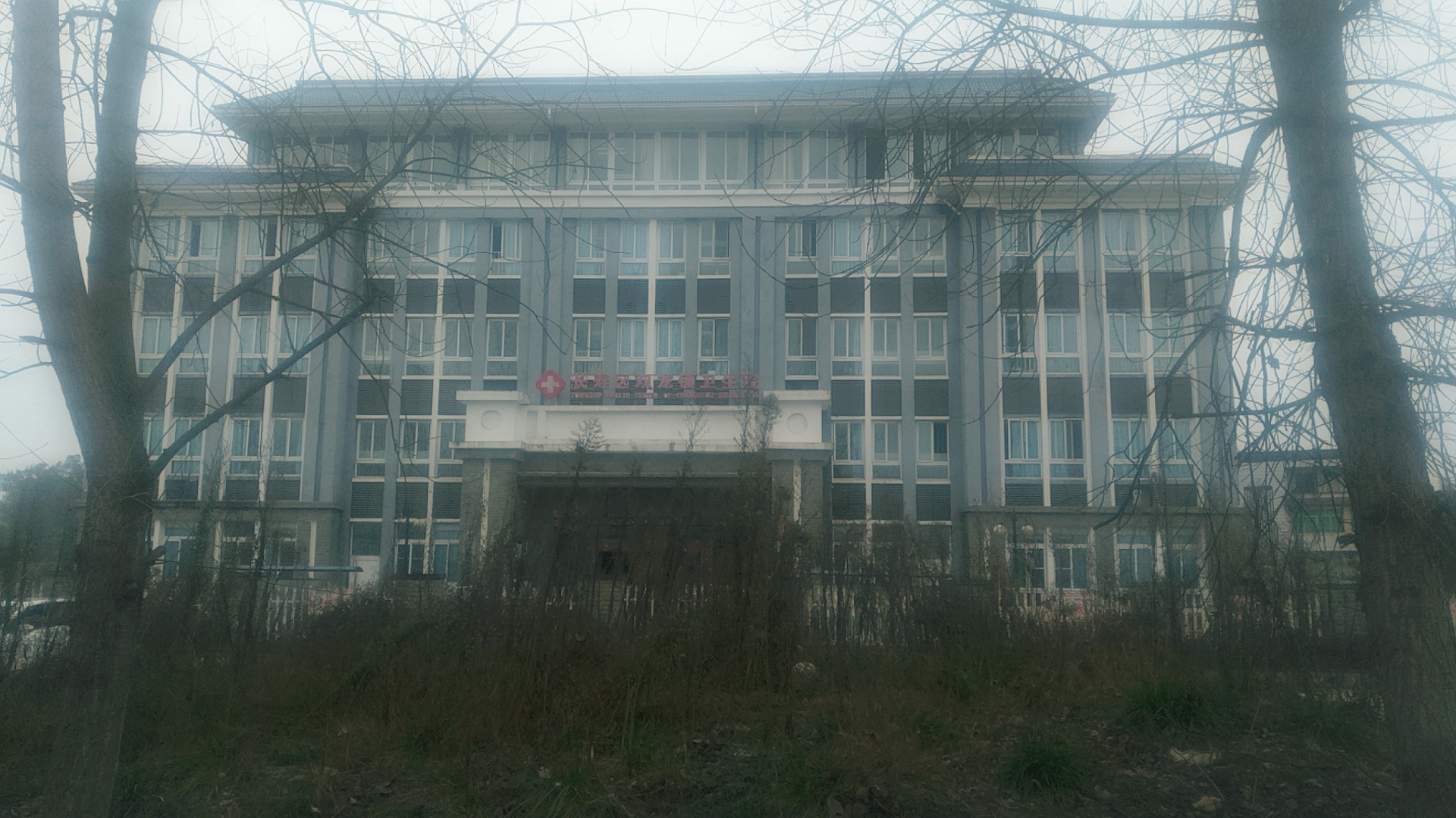 A government building in shuanglong town, longevity district, chongqing, China